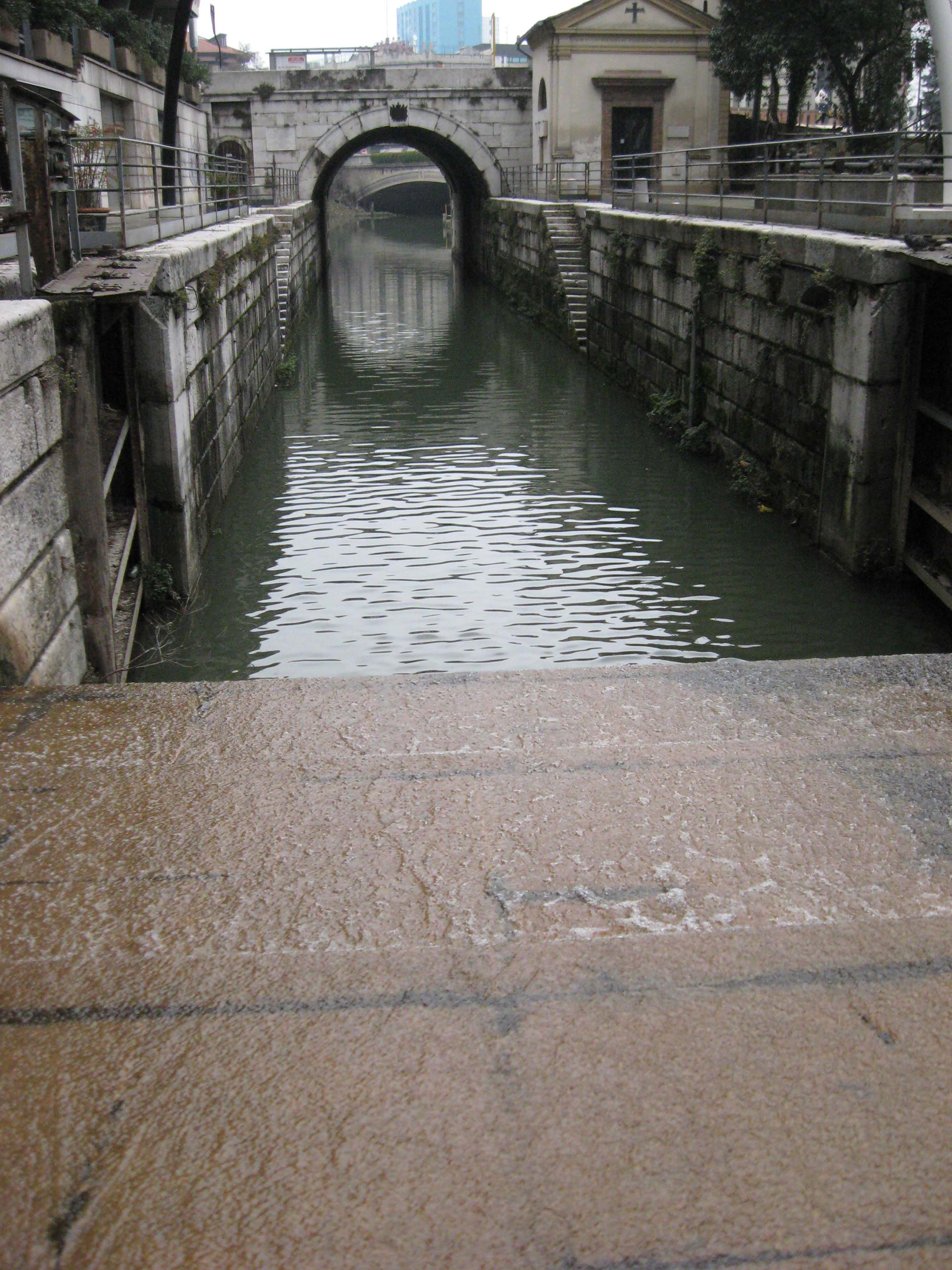 Porte Contarine Padova